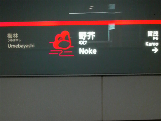 福岡市地下鉄七隈線野芥駅の駅名標